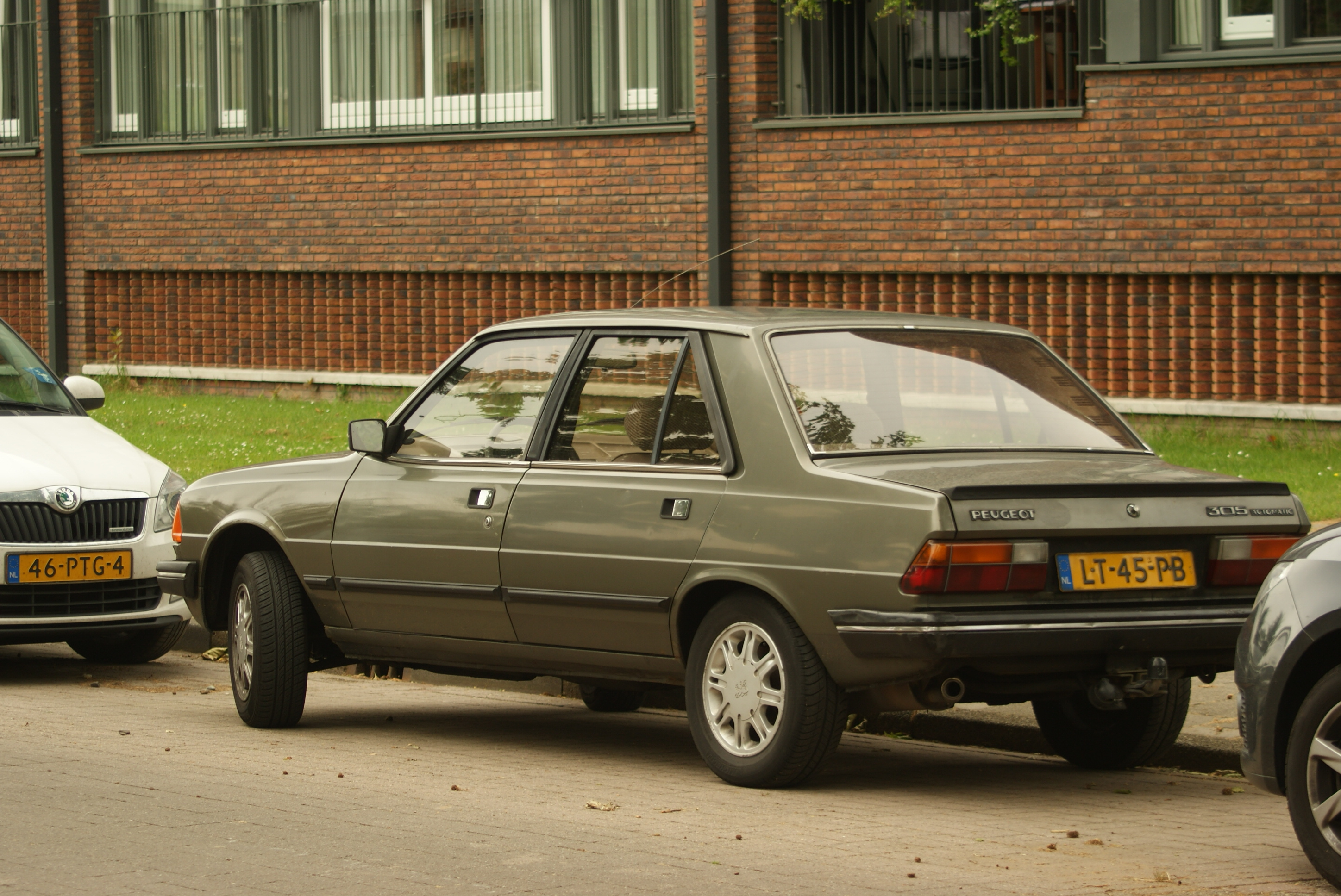 LT-45-PB